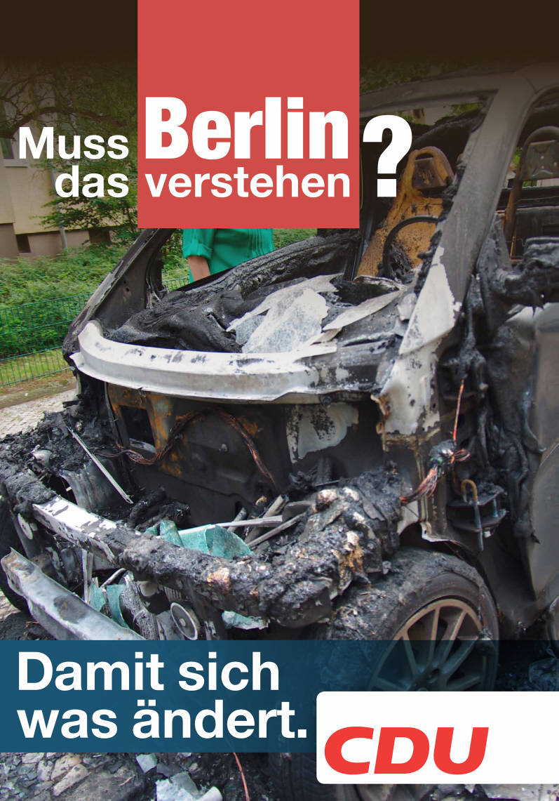 Muss Berlin das verstehen? Damit sich was ändert. CDU Abbildung: Ausgebranntes Autowrack Plakatart: Motiv-/Textplakat Objekt-Signatur: 10-004 : 1909 Bestand: Plakate zu Abgeordnetenhauswahlen Berlin (10-004) GliederungBestand10-18: Plakate zu Abgeordnetenhauswahlen Berlin (10-004) » CDU Lizenz: KAS/ACDP 10-004 : 1909 CC-BY-SA 3.0 DE